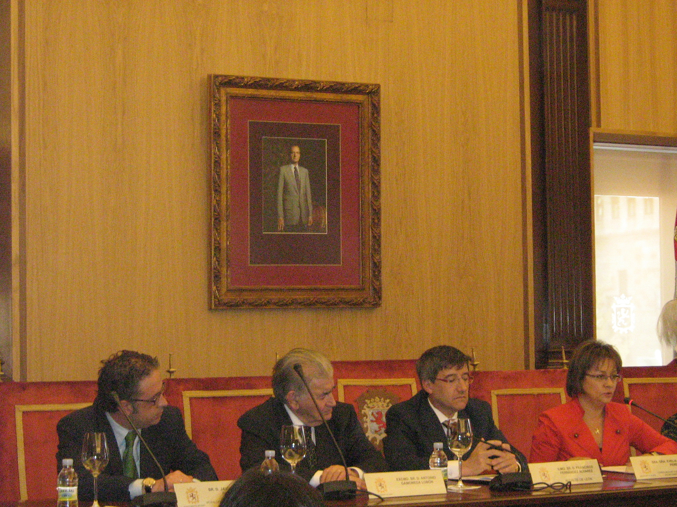 Antonio Gamoneda en el Ayuntamiendo de León, noviembre de 2007